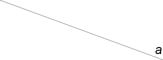 Přímka